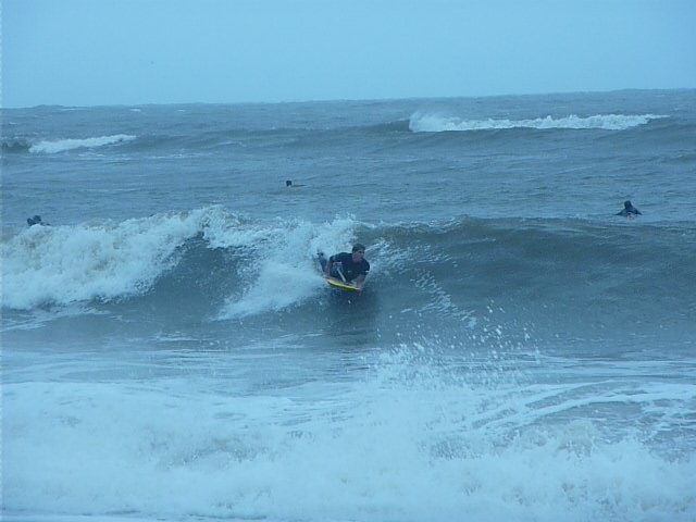 Surfista en playa la balconada. Rocha, Uruguay.